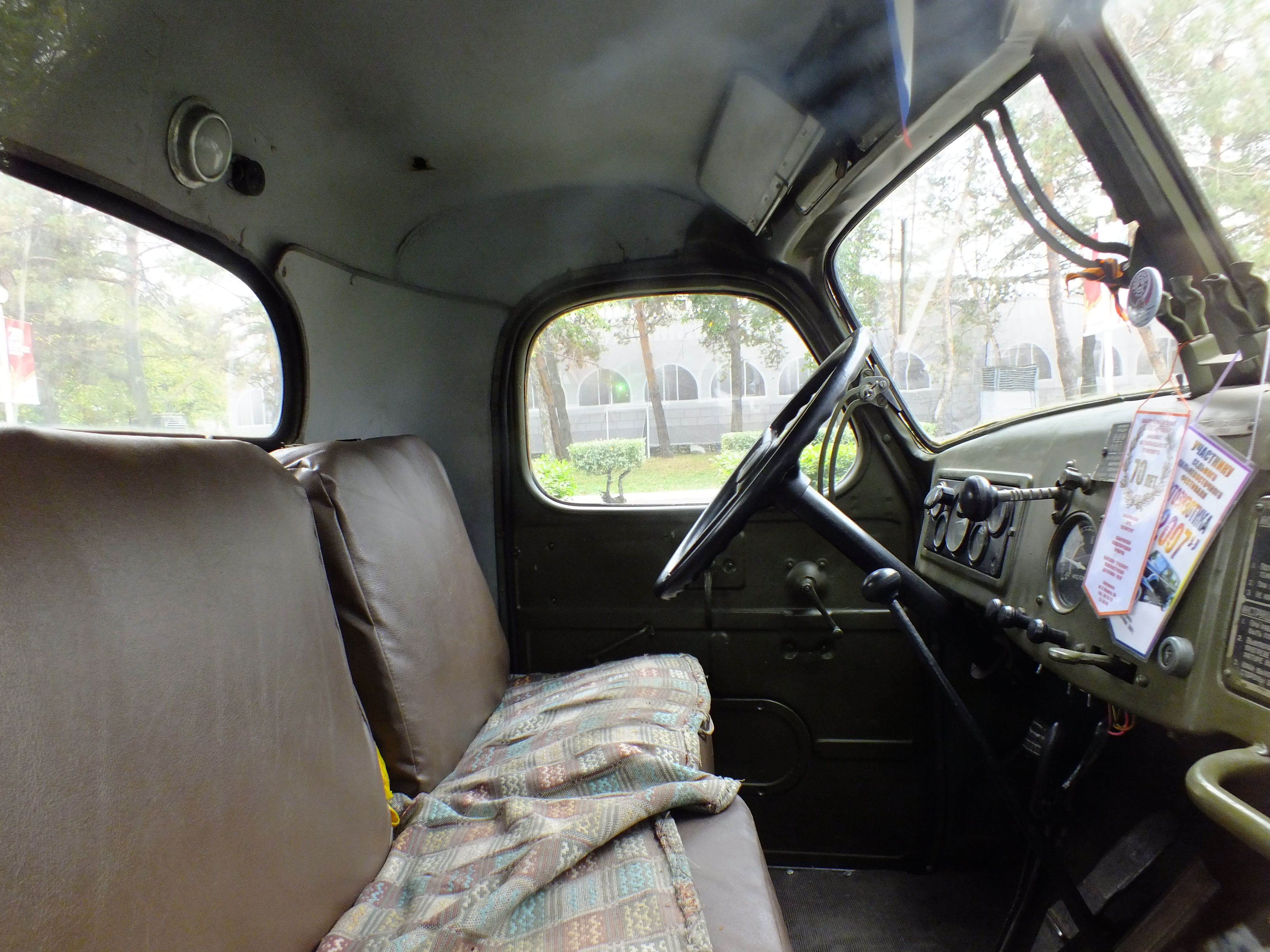 ZiL-164